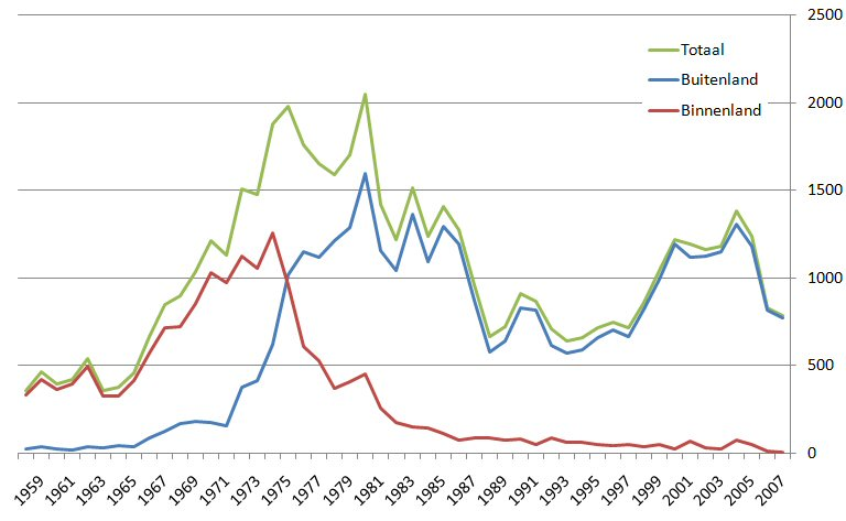 Adopties in Nederland 1956-2006